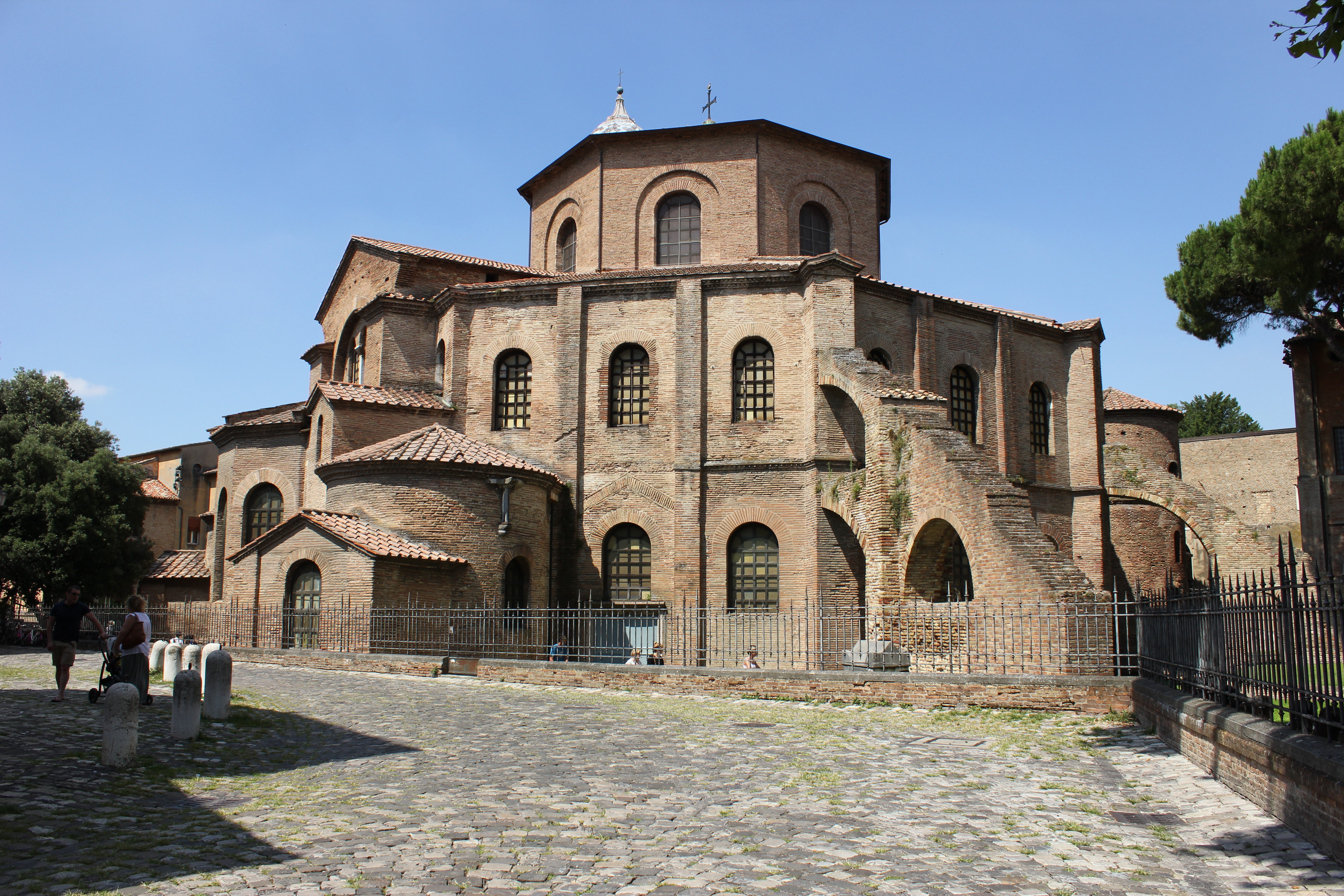 Базилика „Св. Виталий“ в Равена, Италия